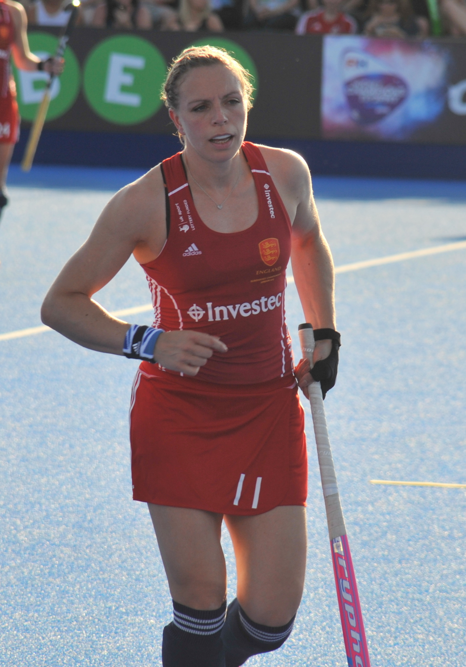 Kate Richardson-Walsh